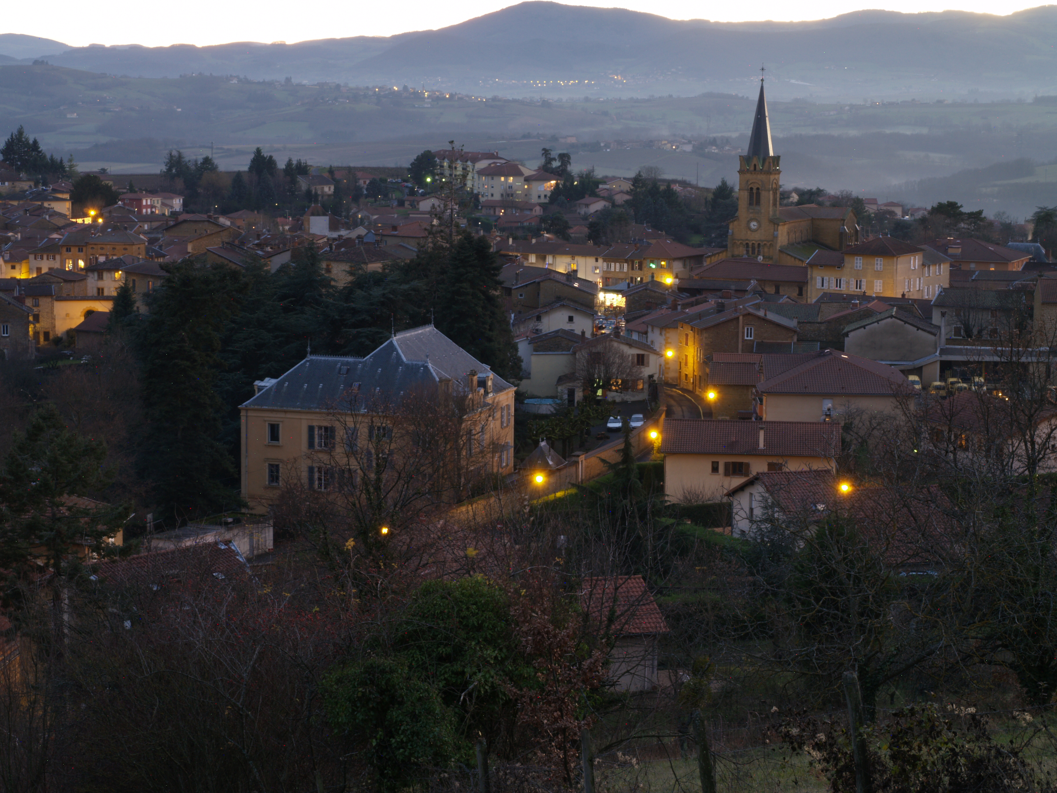 Coucher de soleil sur le bourg du Bois d'Oingt pris depuis les "hauteurs" du Bois du Sud